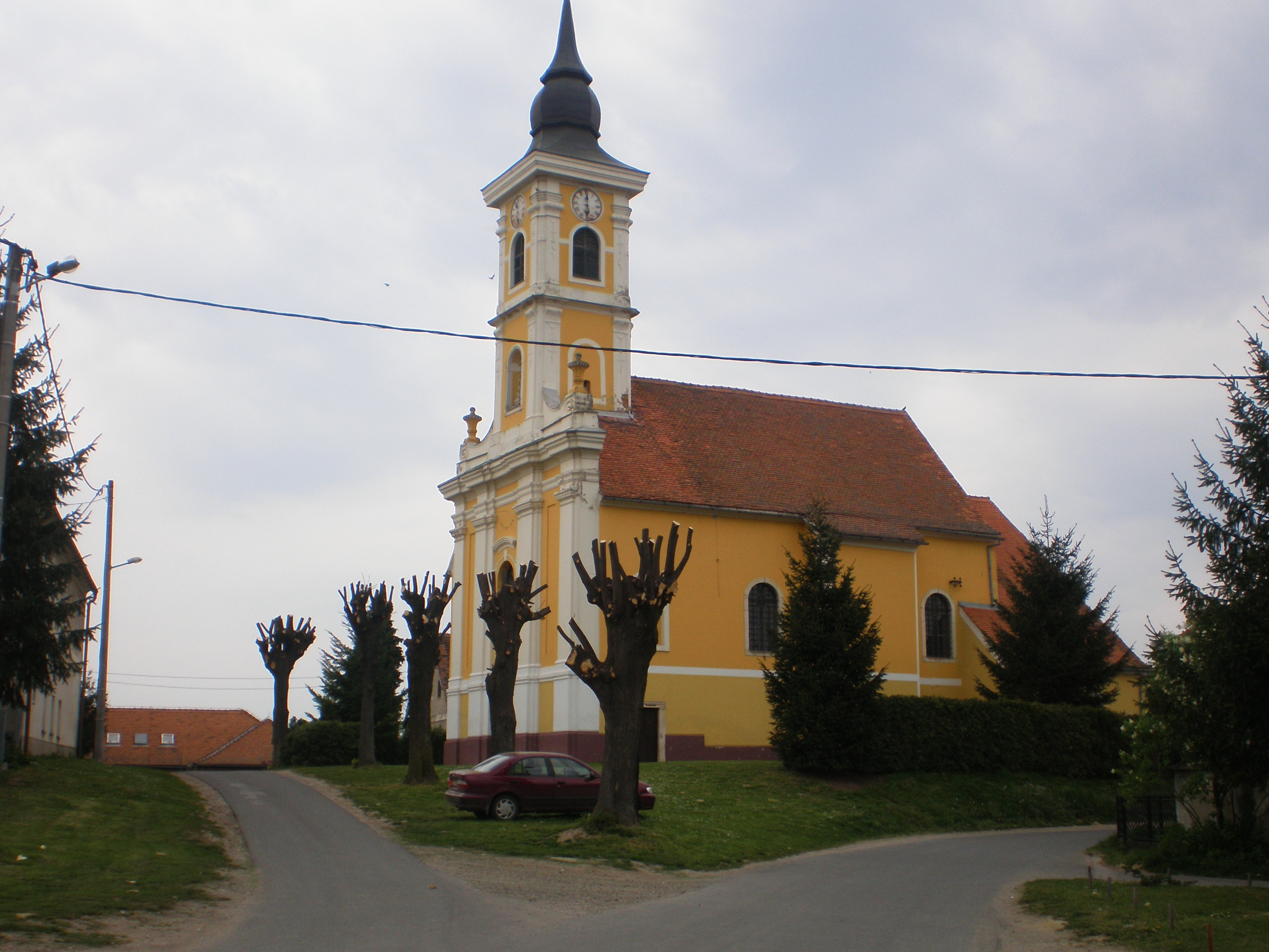 Church in Jalžabet / Crkva sv. Elizabete Ugarske u Jalžabetu